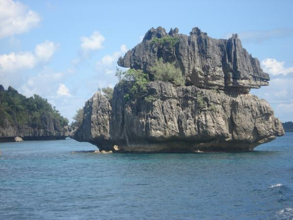 Magsaysay